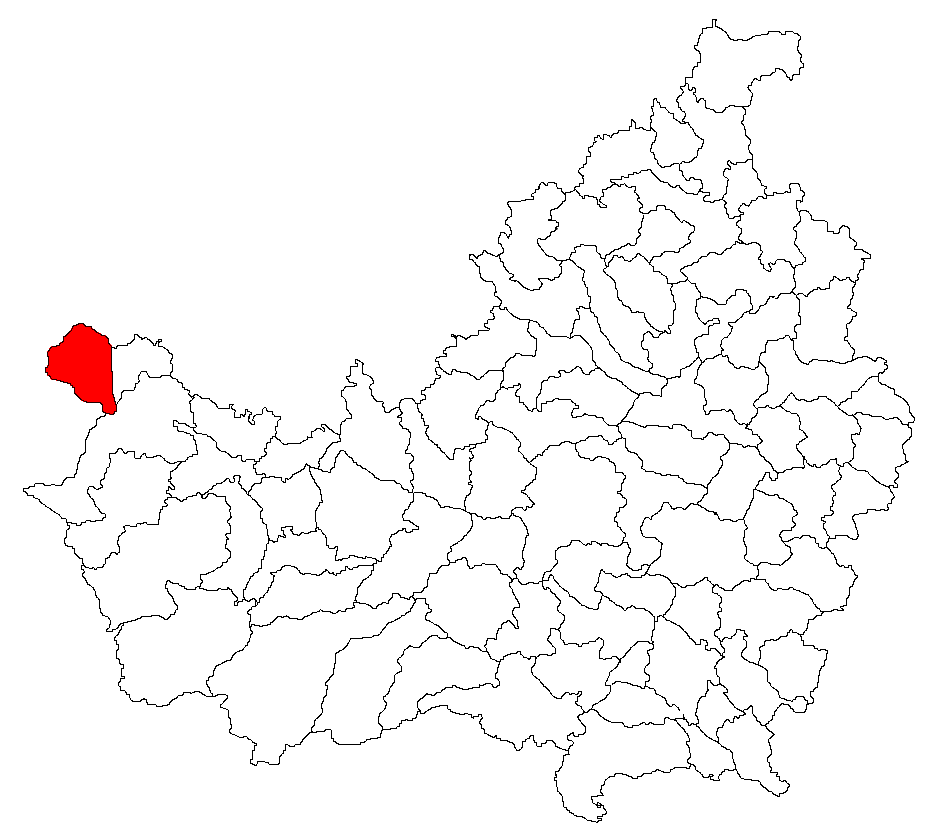 Categorie:Hărţi ale judeţului Cluj